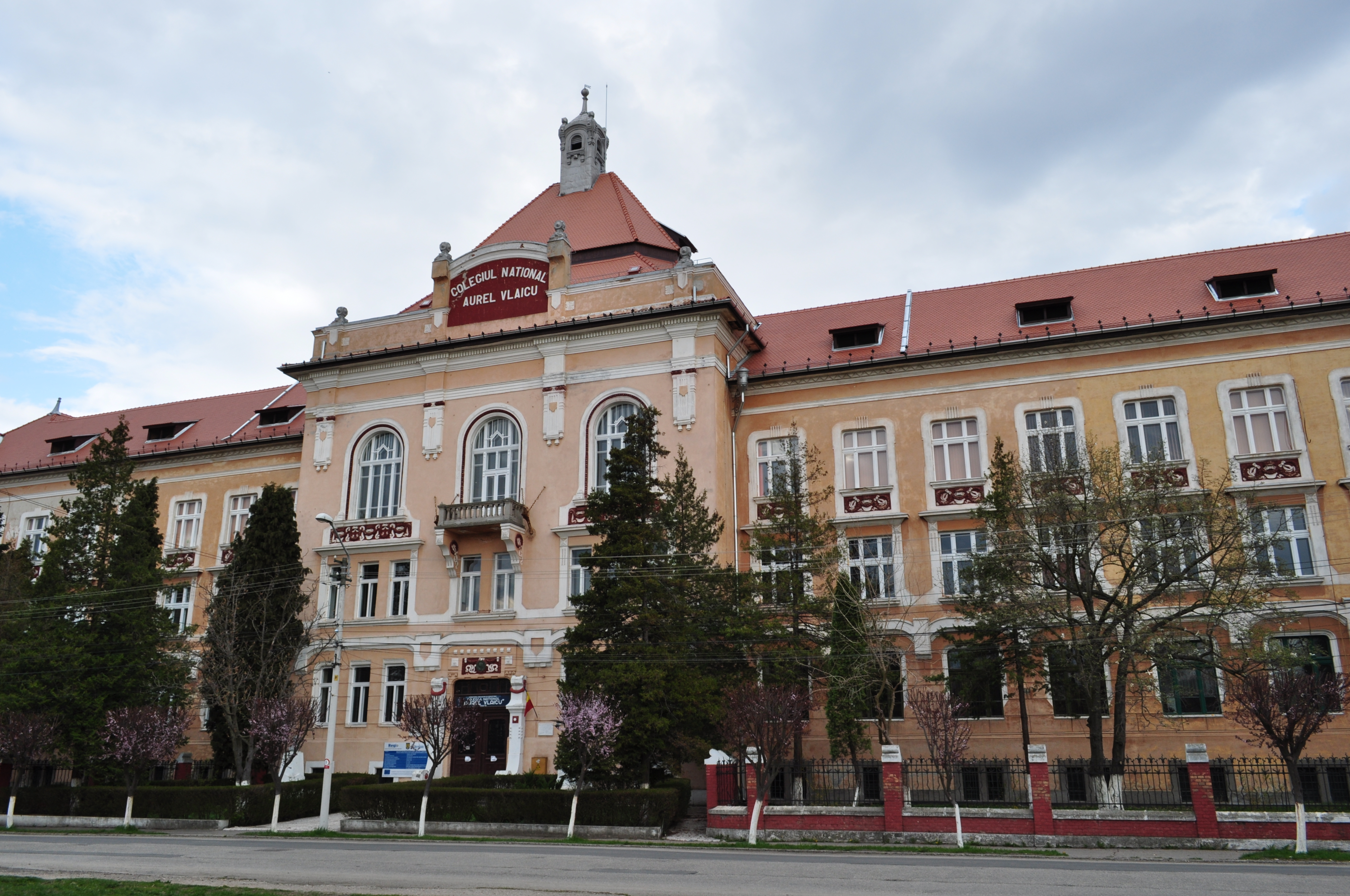 Liceul Kşn, azi Colegiul Naţional "Aurel Vlaicu"